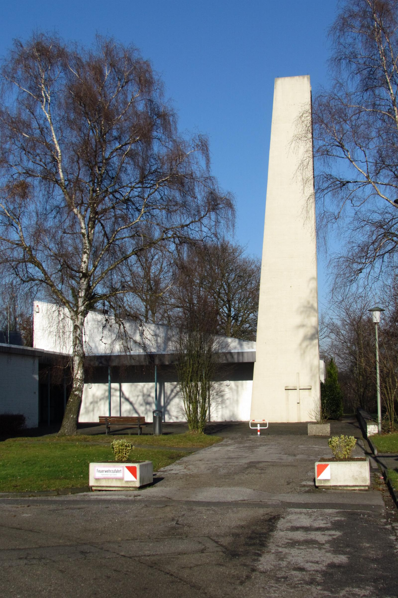 Kirchen und Kapellen in Übach-Palenberg